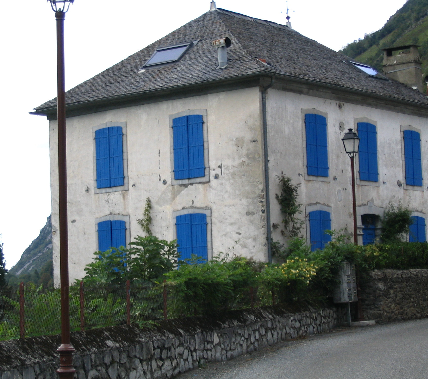 Maison dans le village d'Aste-Béon, Pyrénées-Atlantiques, France. Ancienne maison de la famille Figué. House in the village of Aste-Béon in the French Pyrenees Auteur/author: P Charpiat - 2006